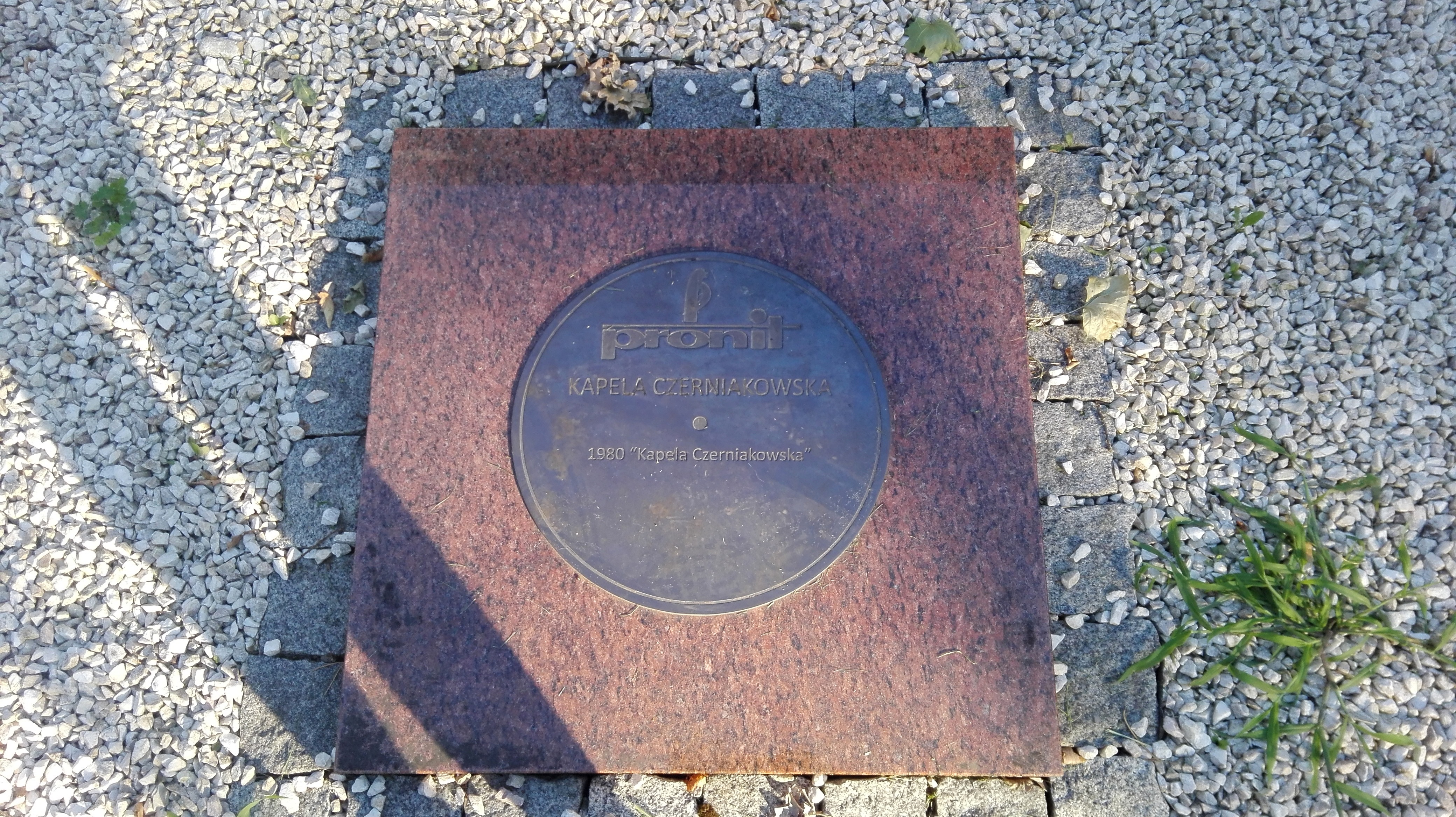 Pionki, w Centrum Aktywności Lokalnej została utworzona Izba Regionalna „Czarnej Płyty”, Kapela Czerniakowska.